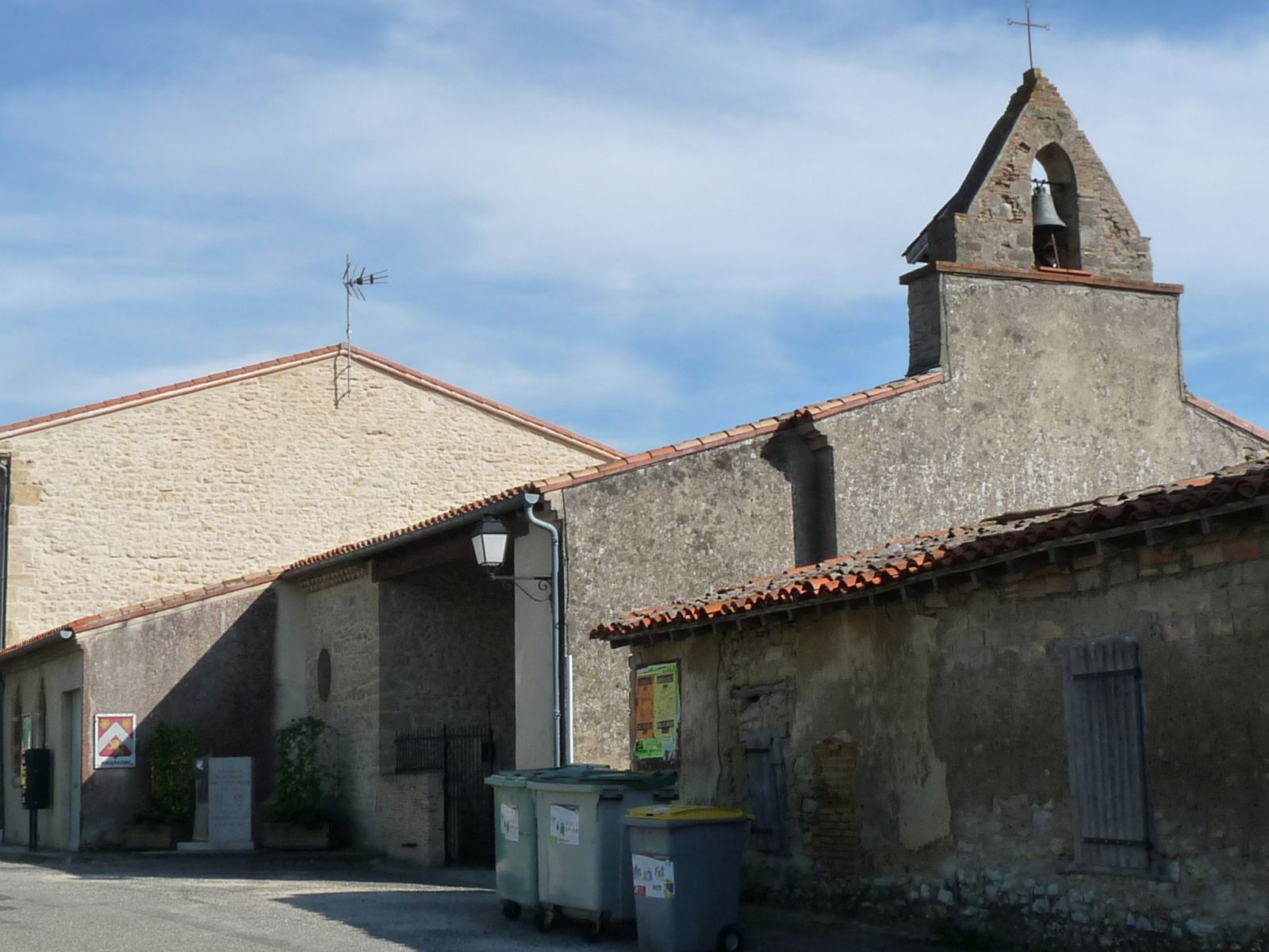 Eglise de Rieumajou, Haute-Garonne, France